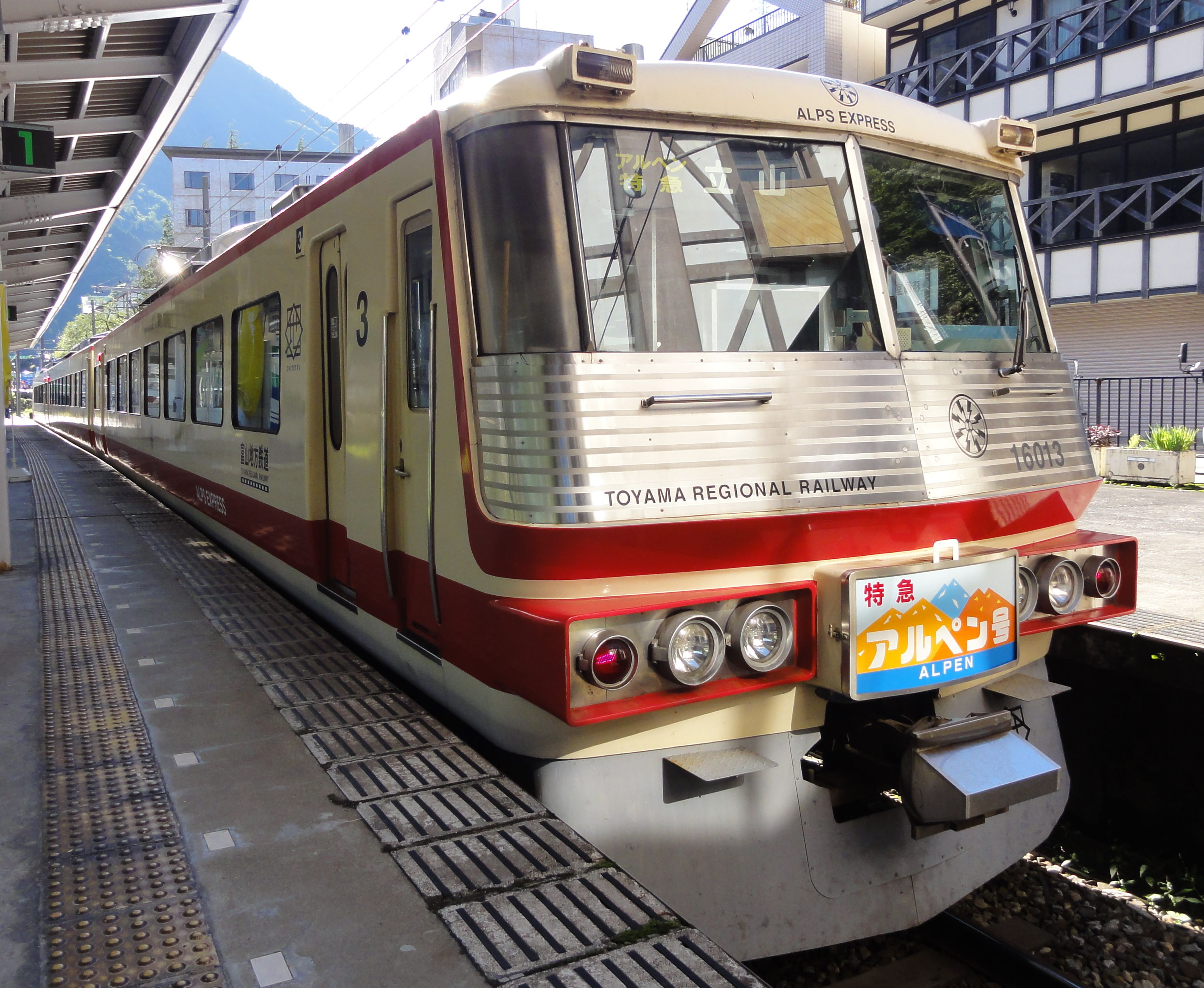 富山地方鉄道16010形電車 アルプスエキスプレス 特急アルペン